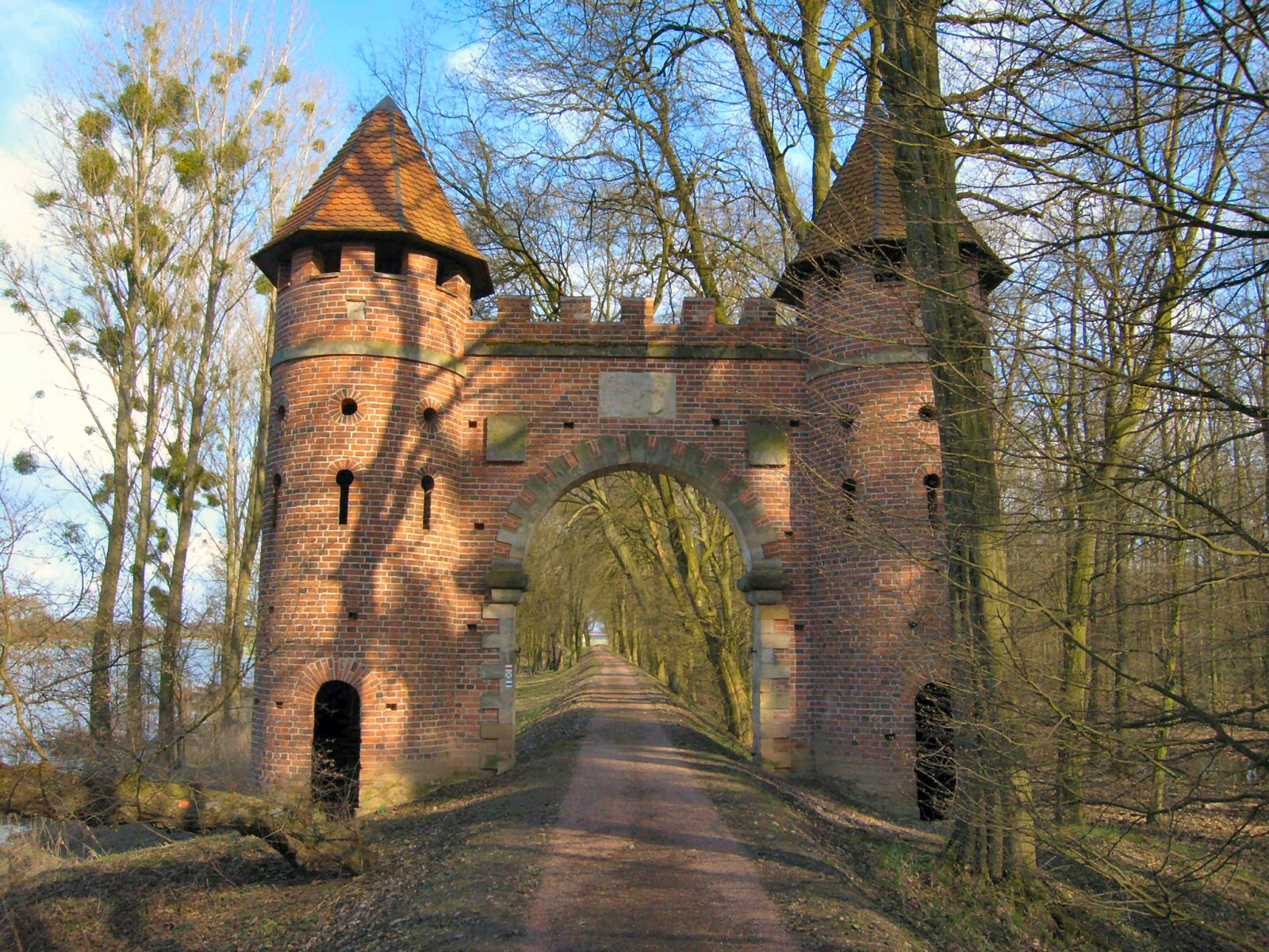 Burgtor im Park Sieglitzer Berg